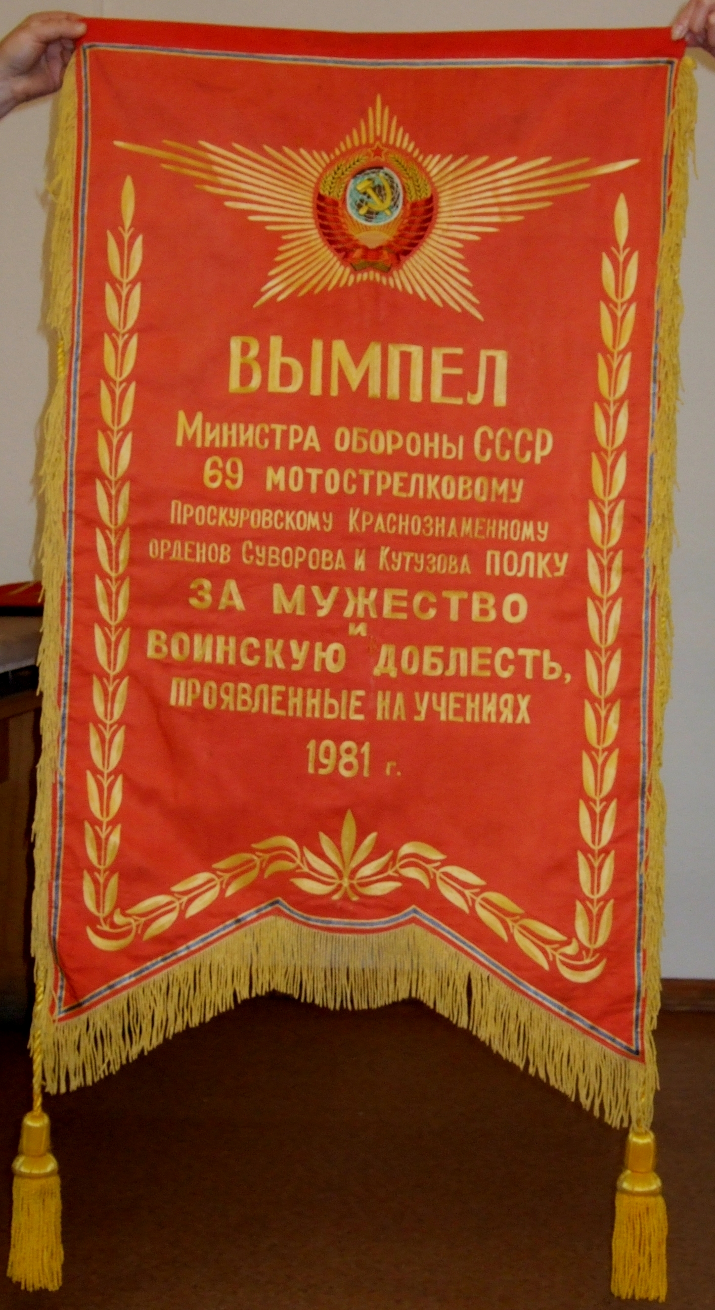 Вымпел Министра обороны СССР "За Мужество и Воинскую доблесть" 69 мотострелковому полку, фото сделано в Знамённом Фонде Центрального музея ВС